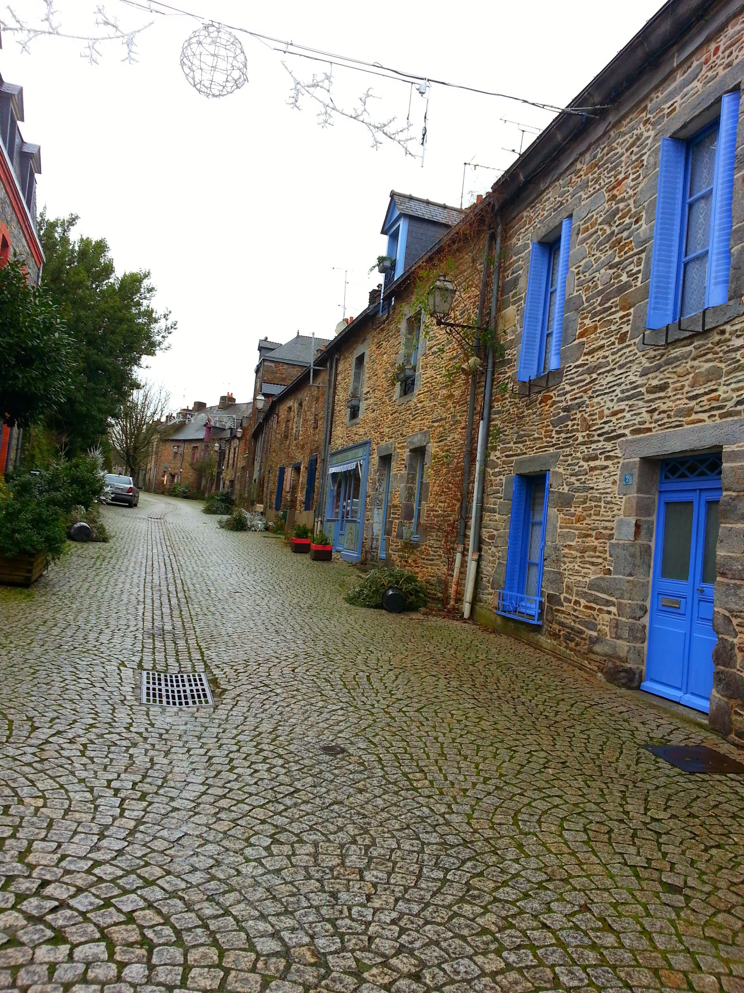 La Gacilly, un des plus beaux villages de Haute-Bretagne